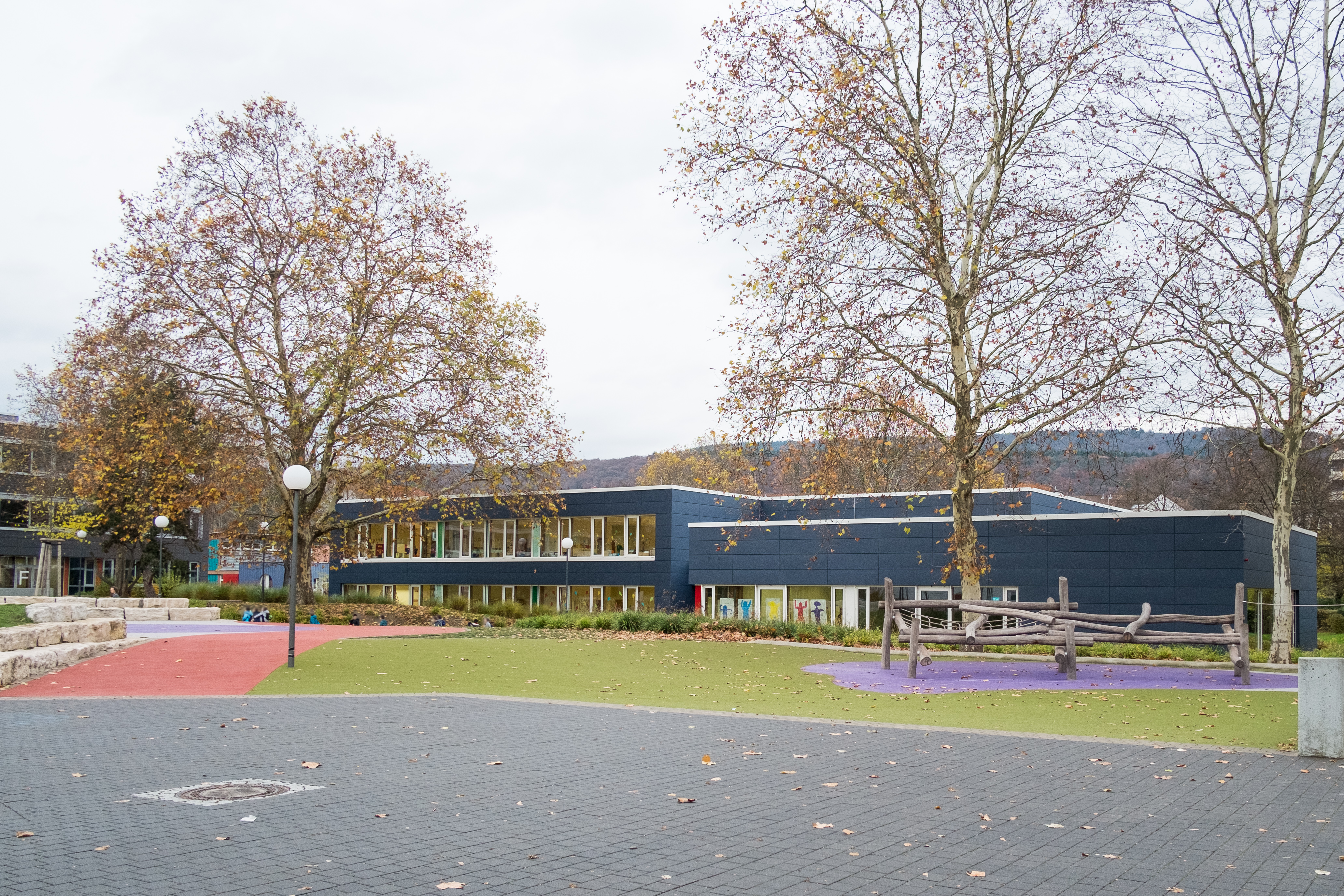 Blick auf die Grundschule (Primarstufe) der IGH, mit Schulhof.